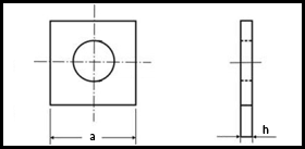 DIN 436